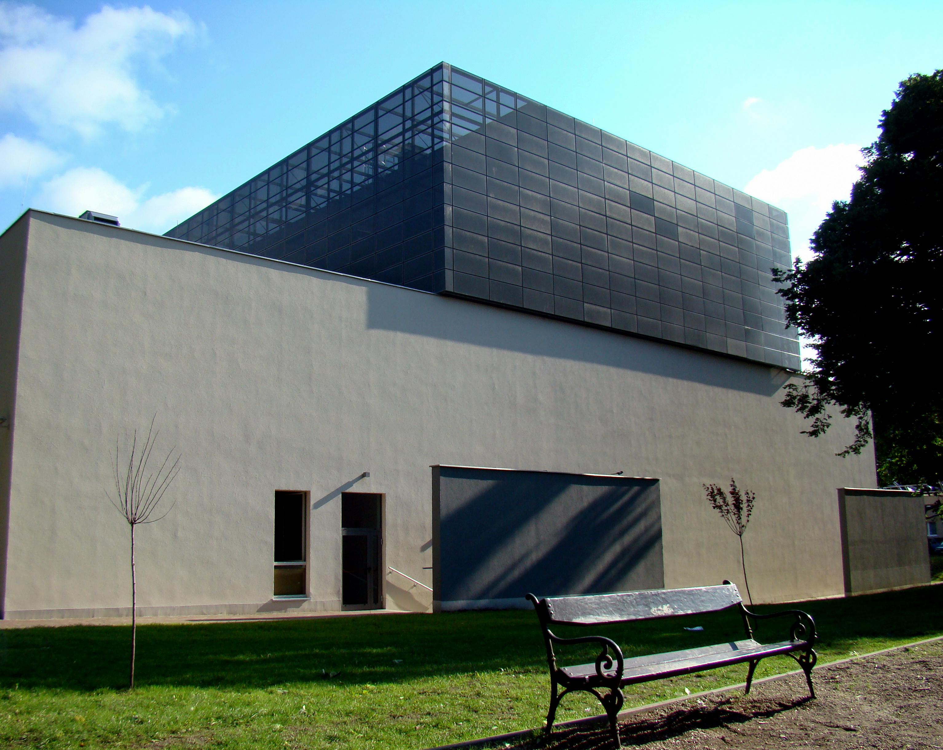 Teatr Lalek Pleciuga, Szczecin, Polska